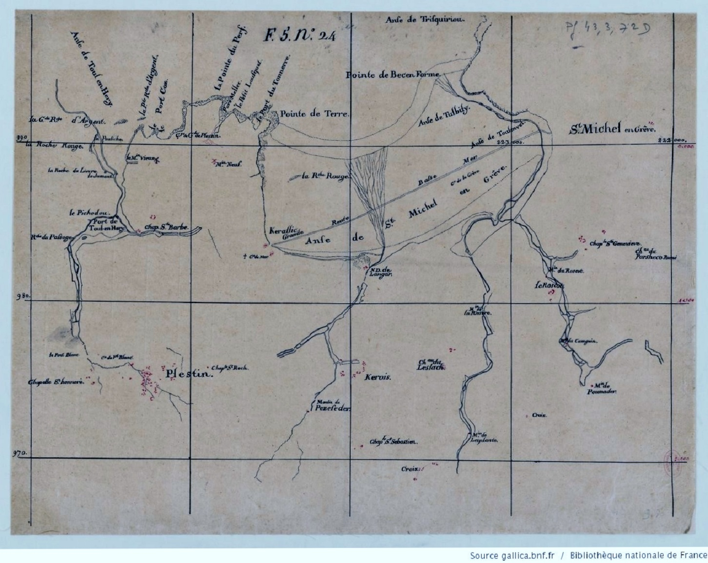 Carte de Plestin et de la "Lieue de Grève" publiée entre 1171 et 1785